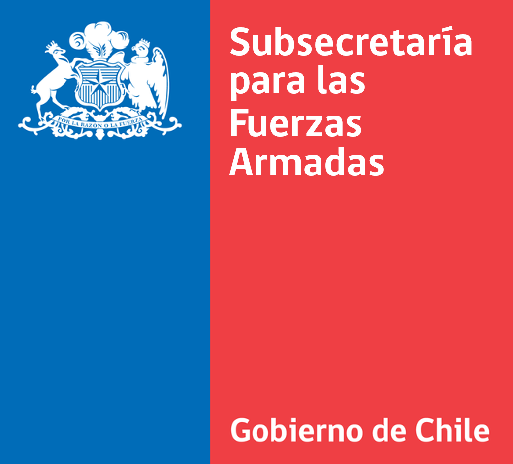 Logo de la Subsecretaria para las fuerzas armadas del Ministerio de Defensa Nacional.